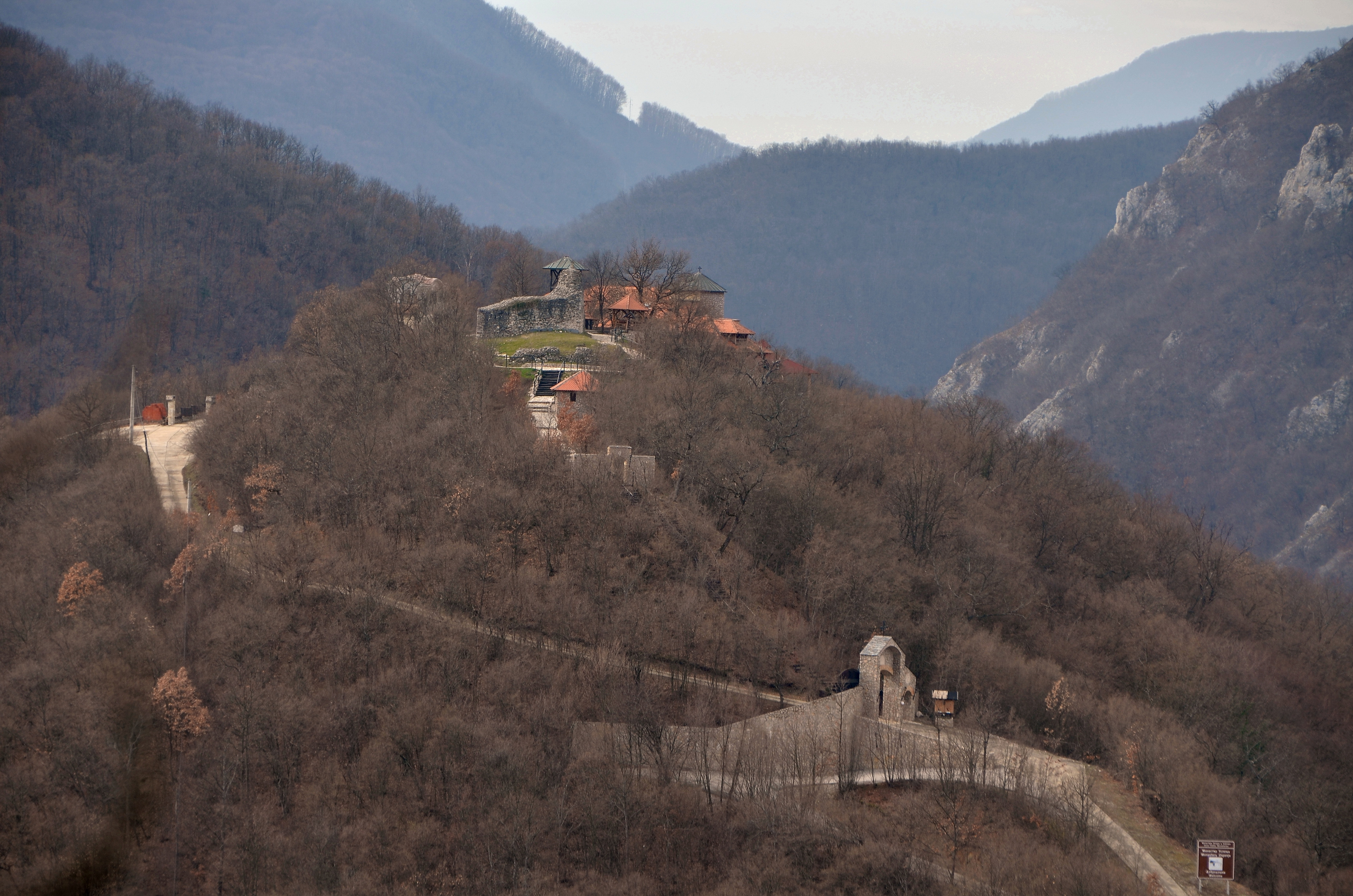 Историјат Јовањског брда везан је за долазак синаита и оснивање монашких заједница на овим просторима у 14. веку, када је подигнута кула Градина.